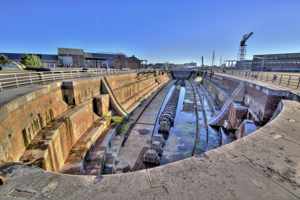 Ontstaan Nieuwe Dok. Het Oude droogdok dat een ongeschikte bodemconstructie heeft voor de drassige grond, is met moeite droog te houden.Het wordt grondig verbeterd en in plaats van de lekkende, houten schipdeur \u2018bateauporte\u2019 (in Medemblik gebouwd en hier naar toe gevaren) die het dok afsluit, komt een ijzeren exemplaar, dat op de werf is gemaakt. De bouw van een nieuw en groter dok is in 1866 gereed. Het Natte Dok wordt verlengd en de zeesluis en het dokkanaal (Boerenverdriet) worden verbeterd. Bij het Nieuwe Dok of Dok II komt een nieuw stoommachinegebouw met een grotere pomp die beide dokken moet bedienen.